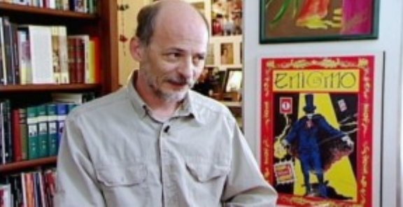 Lourenço Mutarelli (São Paulo, 18 de abril de 1964) é escritor, ator, dramaturgo e autor de histórias em quadrinhos brasileiro